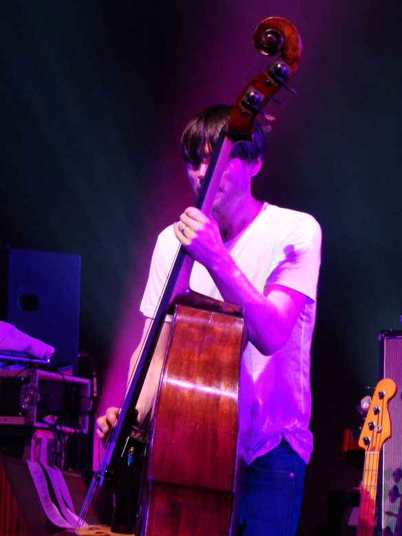 Blur